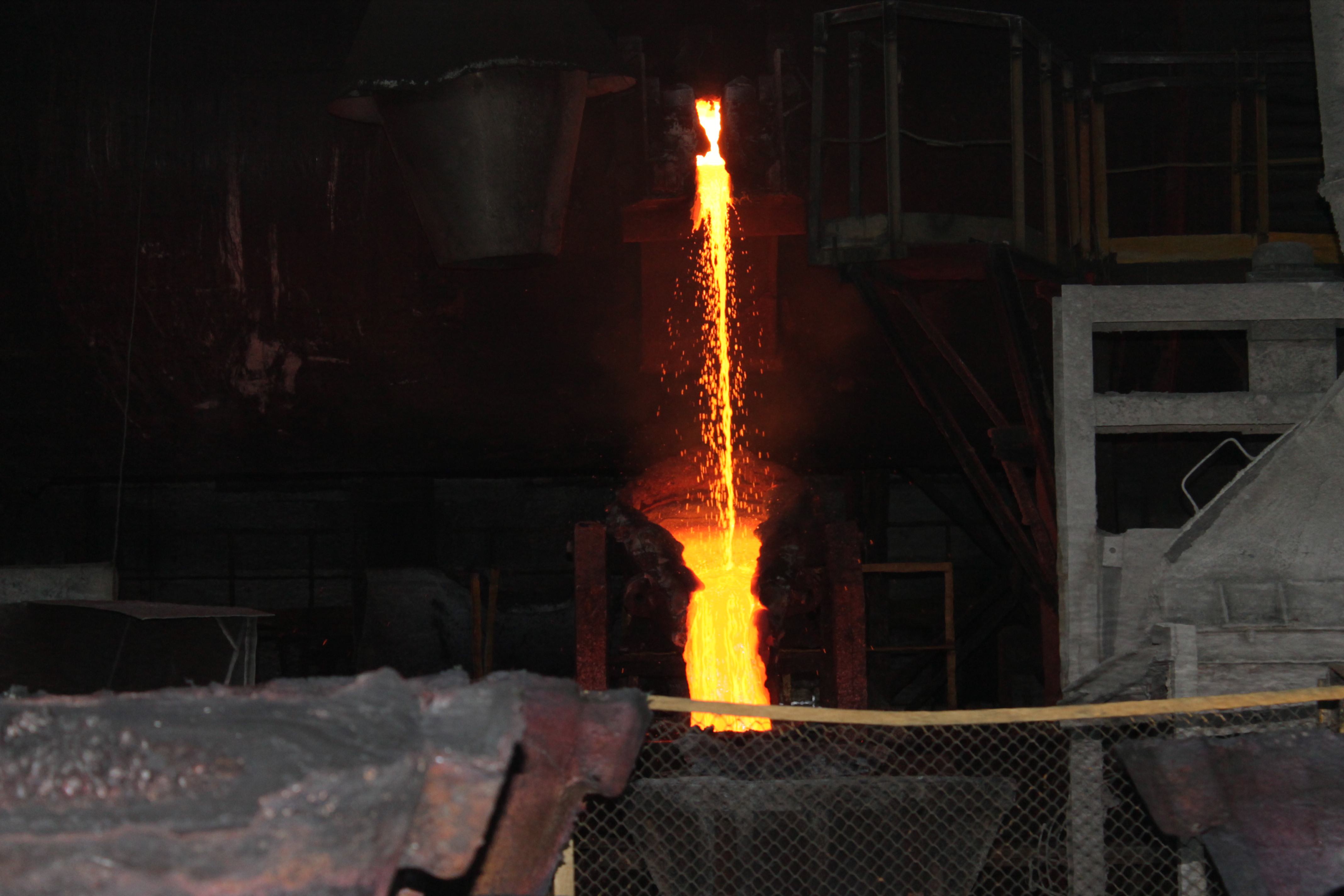 СУМЗ. Выход меди из миксера